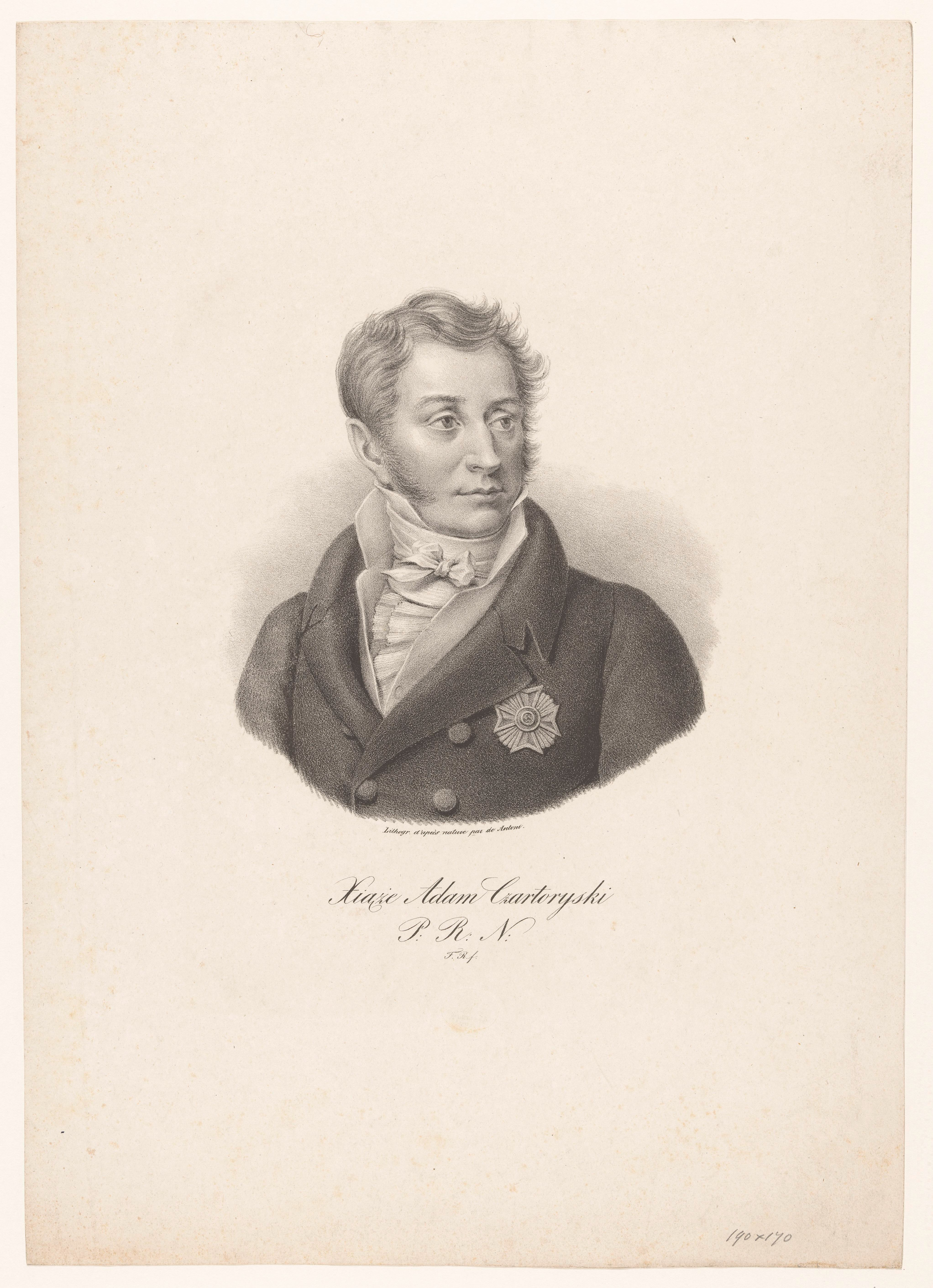 IdentificatieTitel(s): Portret van de Poolse politicus Adam Jerzy CzartoryskiXiazie Adam Czartoryski P.R.N. (titel op object)Objecttype: prent Objectnummer: RP-P-1905-4242Opschriften / Merken: blindstempel, recto, gepreegd: Lugt 3534monogram, recto, gedrukt: ‘F.R.f.’verzamelaarsmerk, verso, gestempeld: Lugt 2228VervaardigingVervaardiger: prentmaker: de Antoni (vermeld op object)prentmaker: Filip Romanowskiuitgever: Gaspare Weiss et Co. (vermeld op object)Plaats vervaardiging: prentmaker: Warschauuitgever: BerlijnDatering: ca. 1831Materiaal: papier Techniek: krijtlithografieAfmetingen: blad: h 429 mm × b 310 mmOnderwerpWat: historical personsWie: Adam Jerzy CzartoryskiVerwerving en rechtenVerwerving: aankoop 1905Copyright: Publiek domein